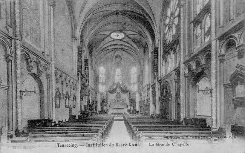 Intérieur de la Grande Chapelle du Collège de Tourcoing (officiellement Institution Libre du Sacré-Coeur) vers 1900.